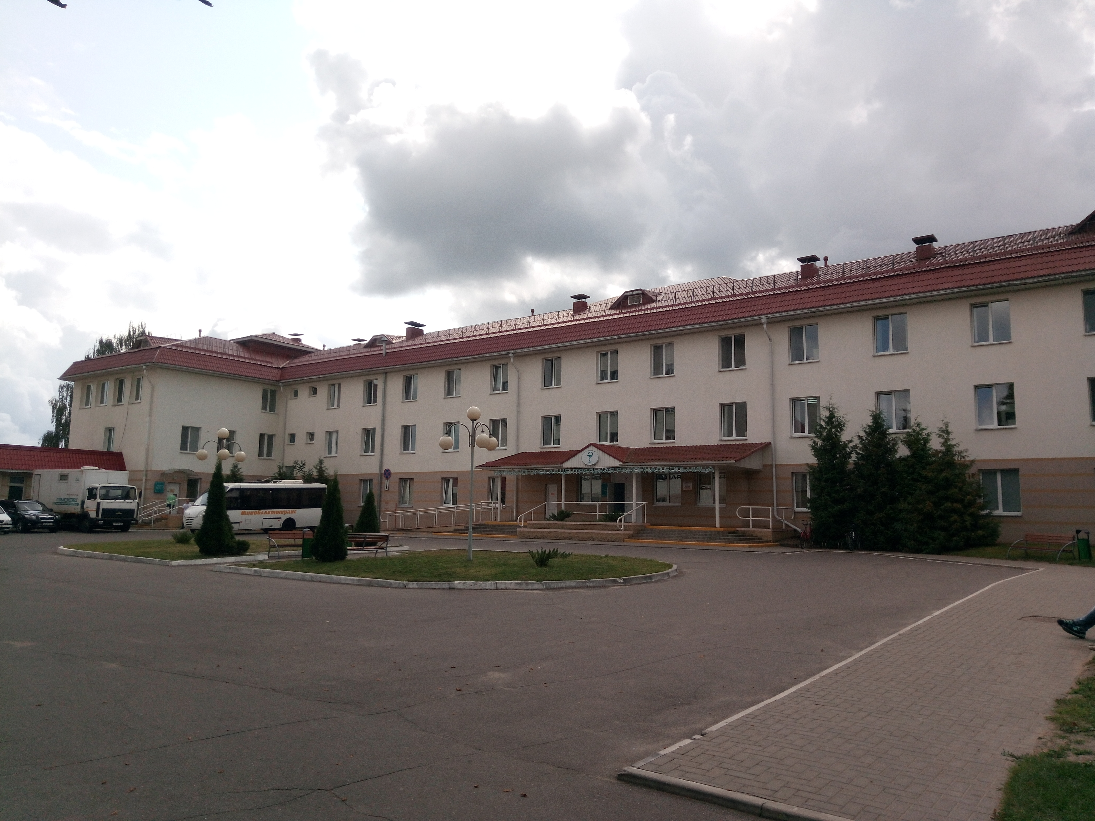 Мар’інагорская цэнтральная раённая бальніца.